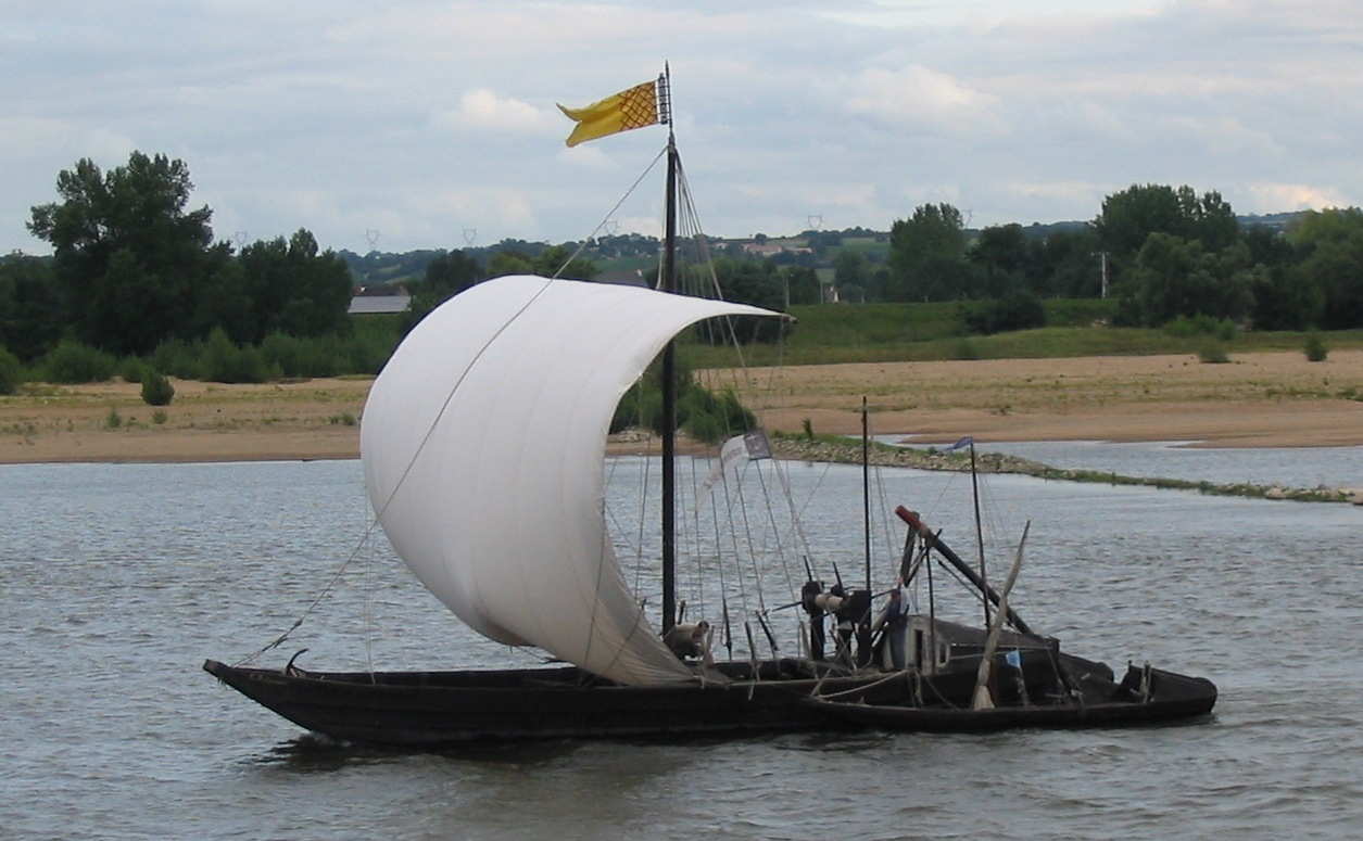 Gabare la Montjeannaise 49570 Montjean-sur-Loire.